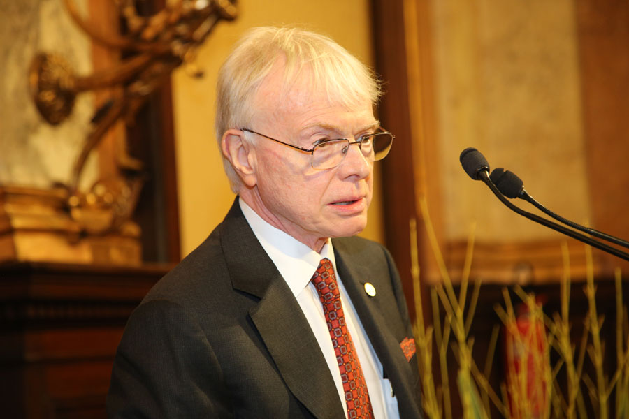 Verleihung der Wilhelm Exner Medaille am 18. November 2014 im Österreichischer Gewerbeverein: Thomas Hughes